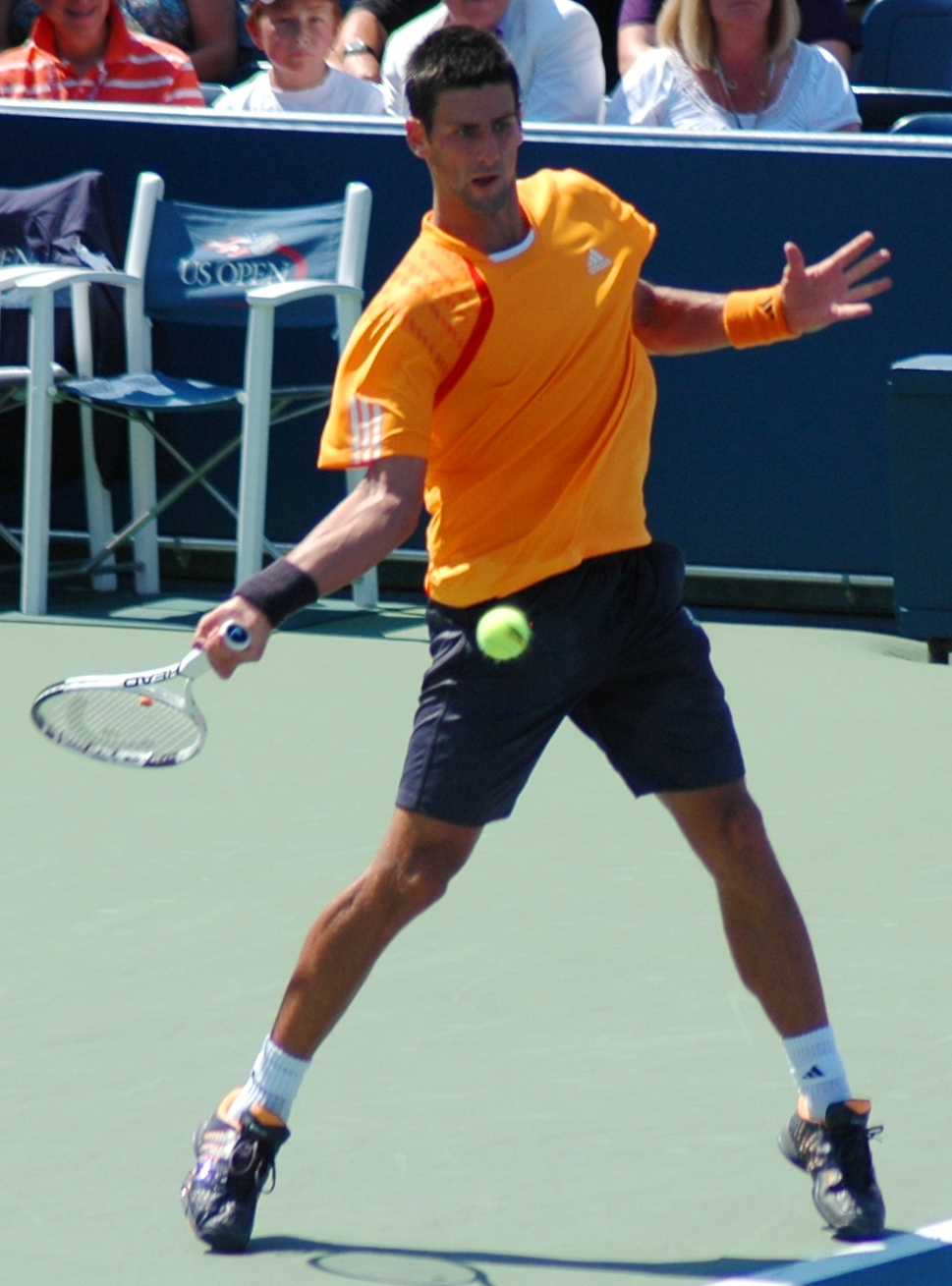 Novak Djokovic US Open 2009